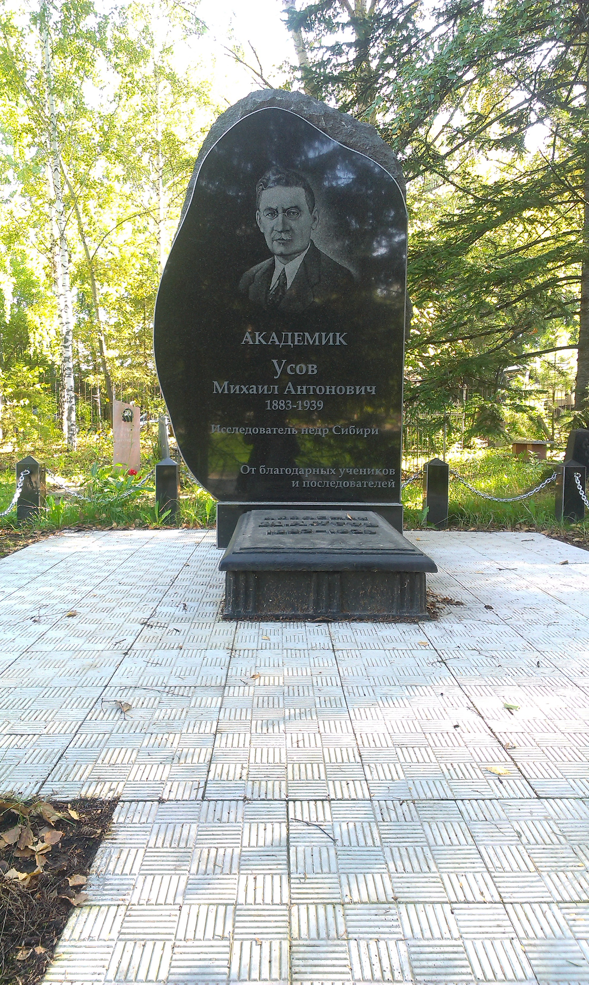 Южное кладбище Томска